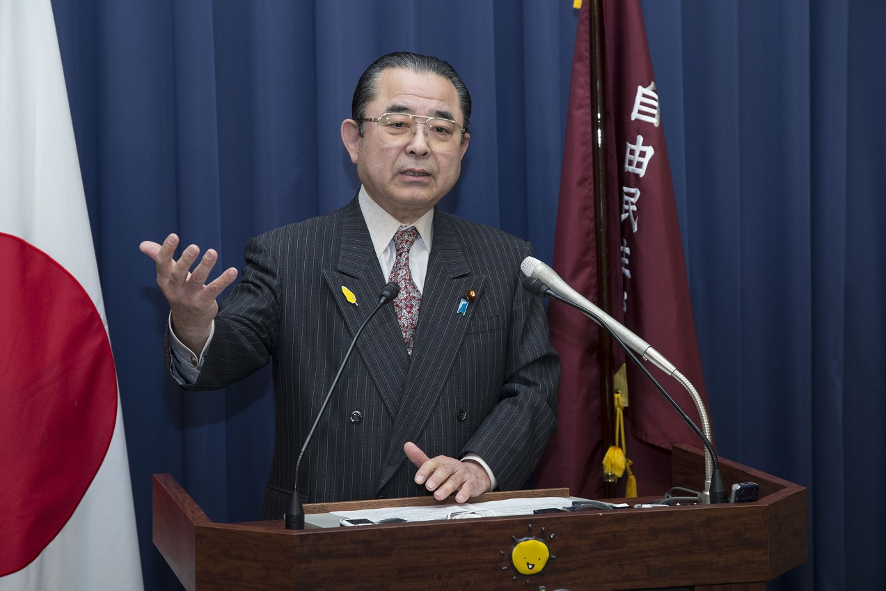 記者会見にて